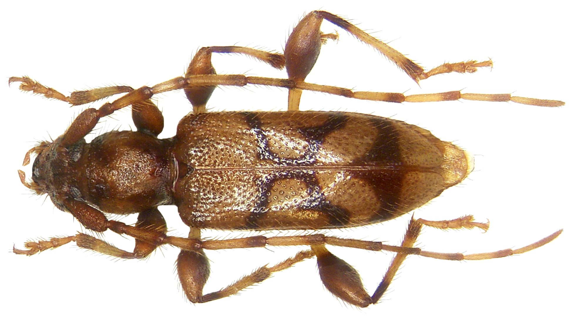 Familie: Cerambycidae Grösse: 8,2 mm Fundort: Papua Neuguinea, Morobe Prov., Poiu leg. A.Riedl, 1998; det. A.Weigel Foto: U.Schmidt, 2007